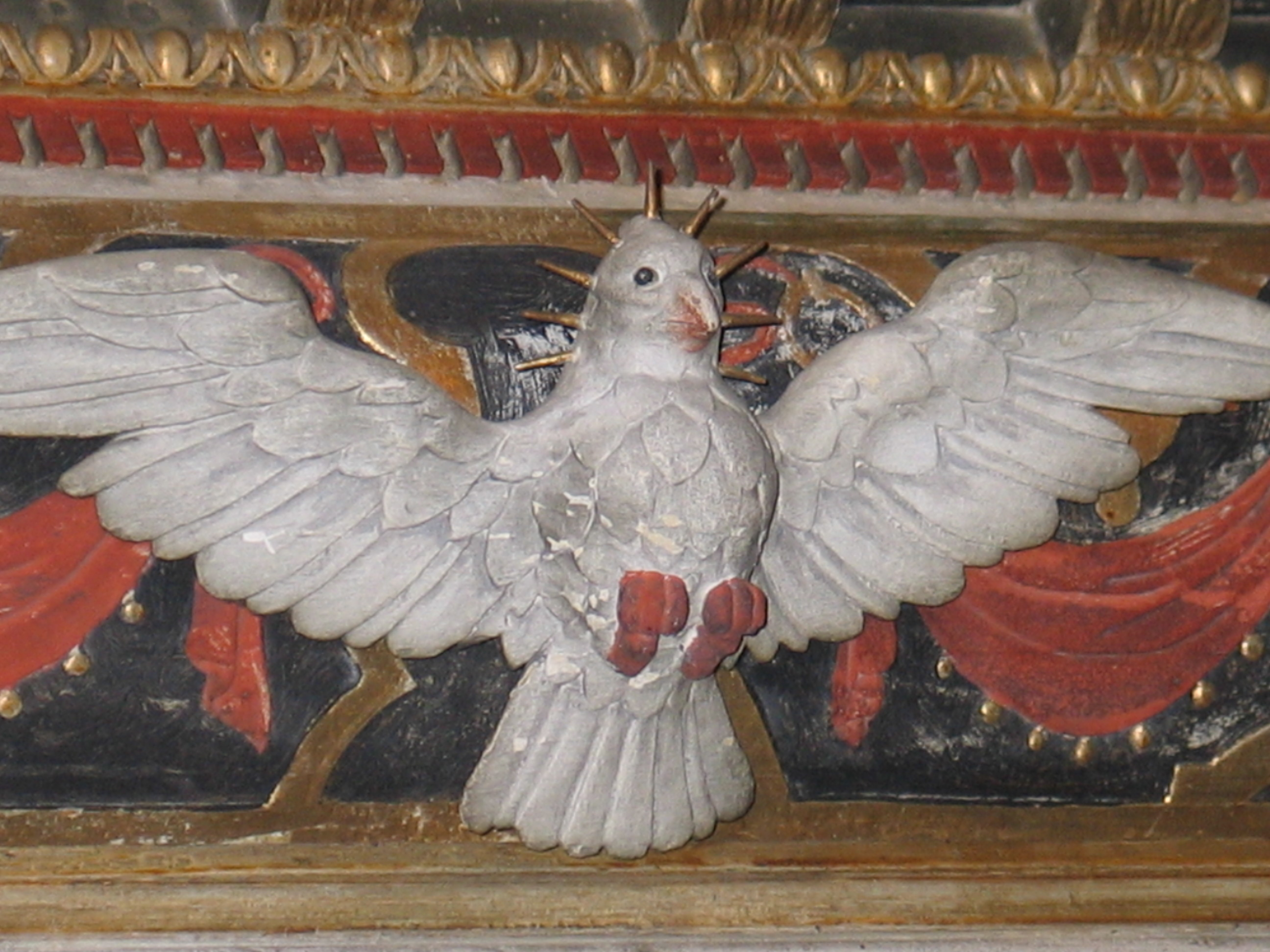 Detail Altar_in St. Johanniskirche (Wolfenbüttel)